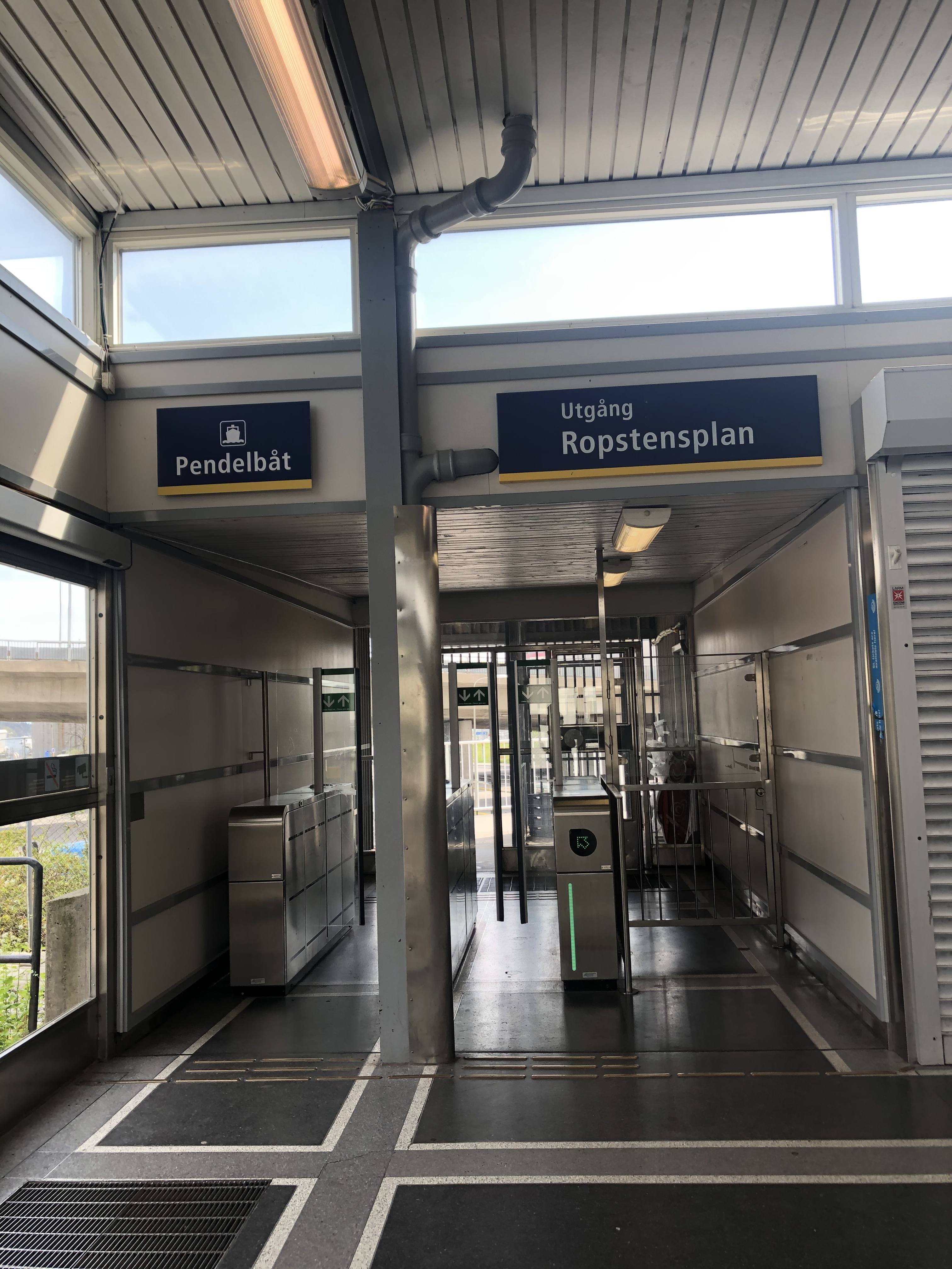 Utgång mot Ropstensplan och Bussar mot Lidingö